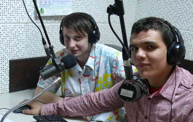 Łukasz Kowalczuk (z lewej) i Mateusz Kapłon podczas prowadzenia Audycji Sportowa Ole